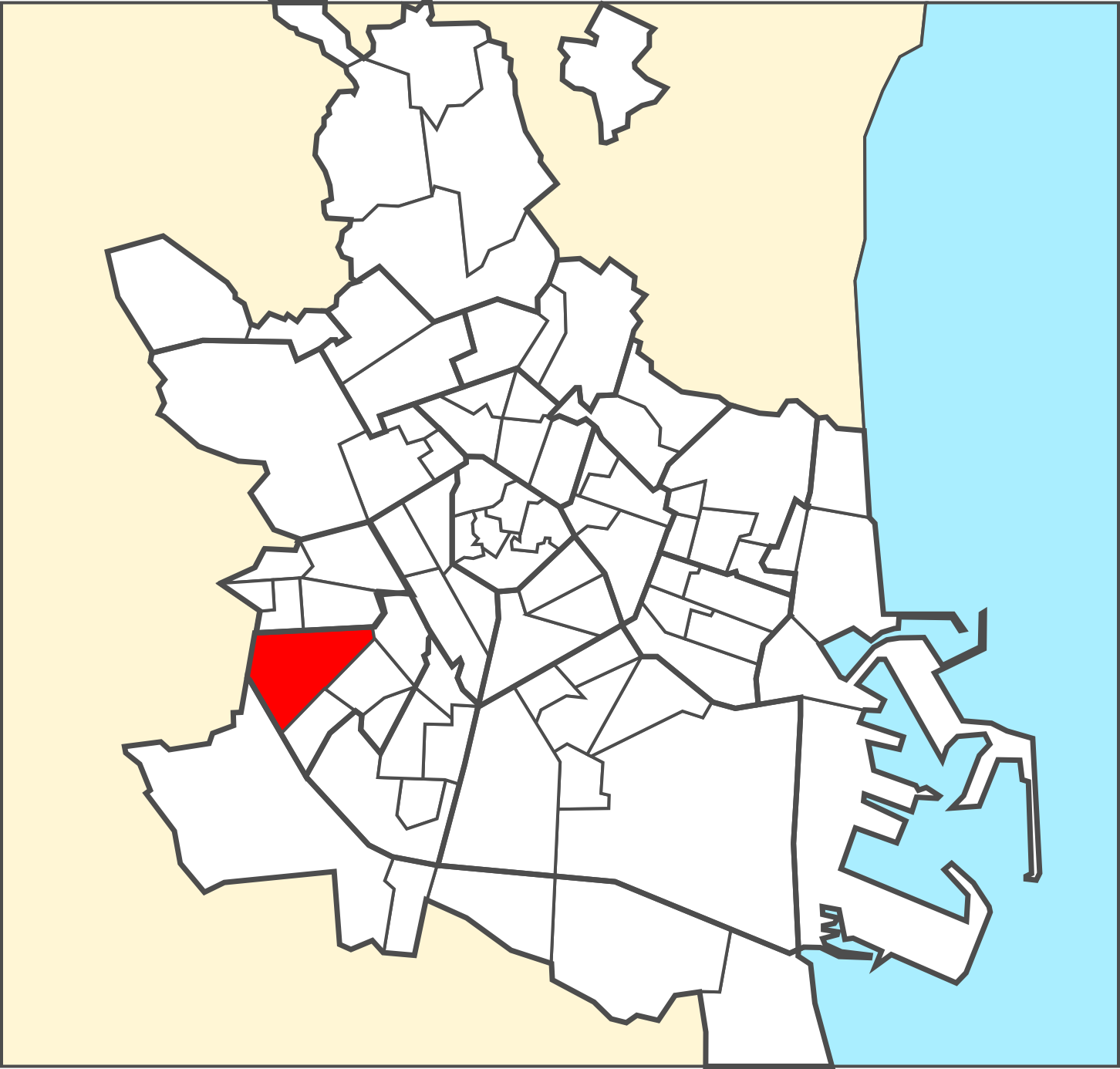 Localització del barri dins de la ciutat de València.